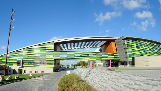 Façade du stade